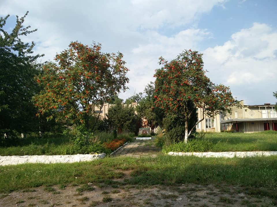 Меморіал загиблим